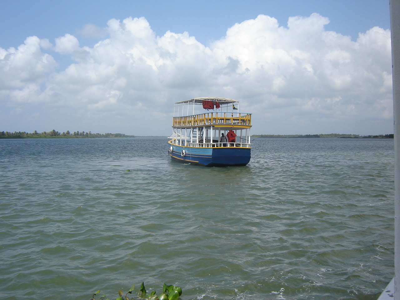 Rio São Francisco.